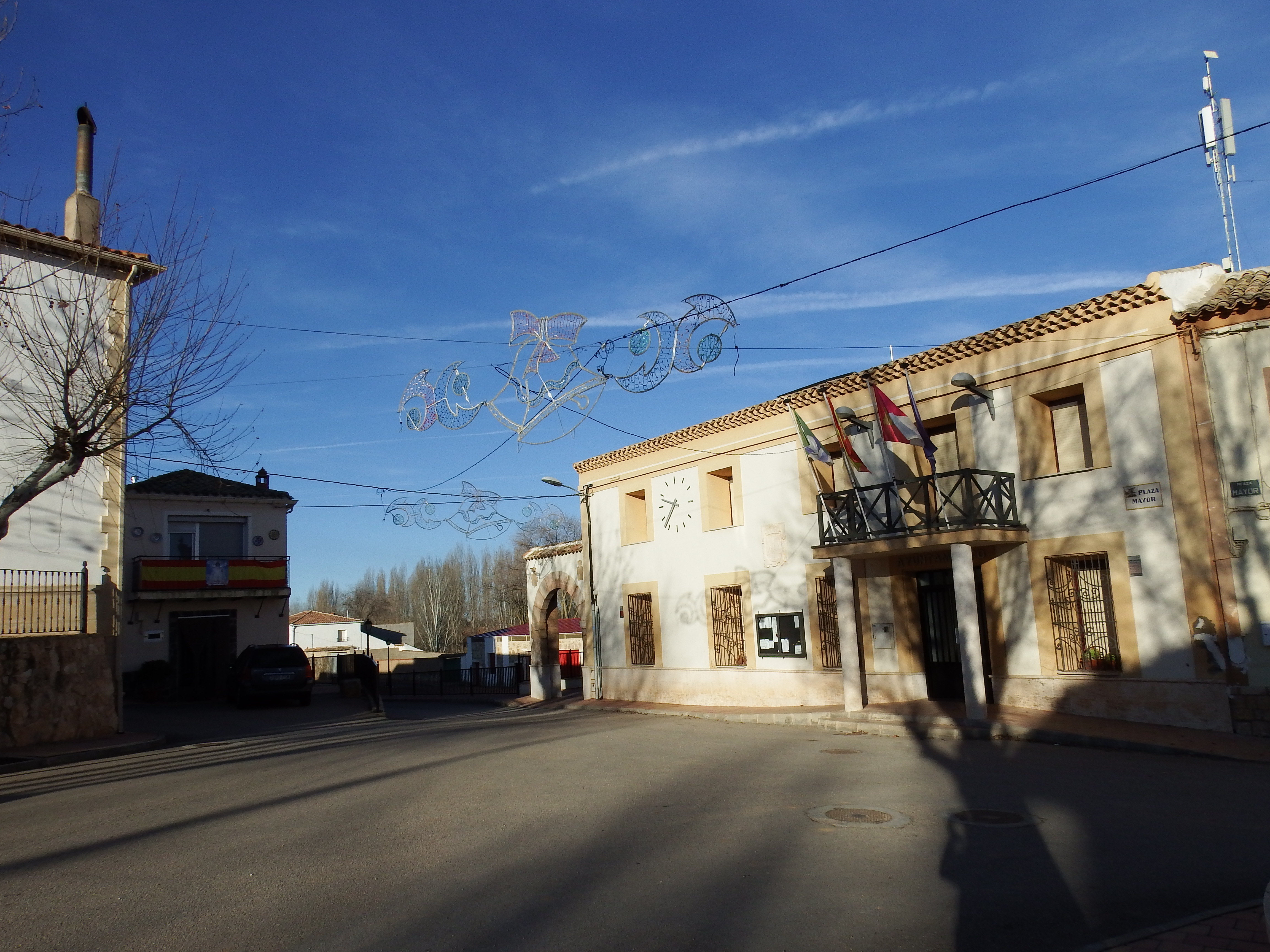 Ayuntamiento de Olmedilla de Alarcón